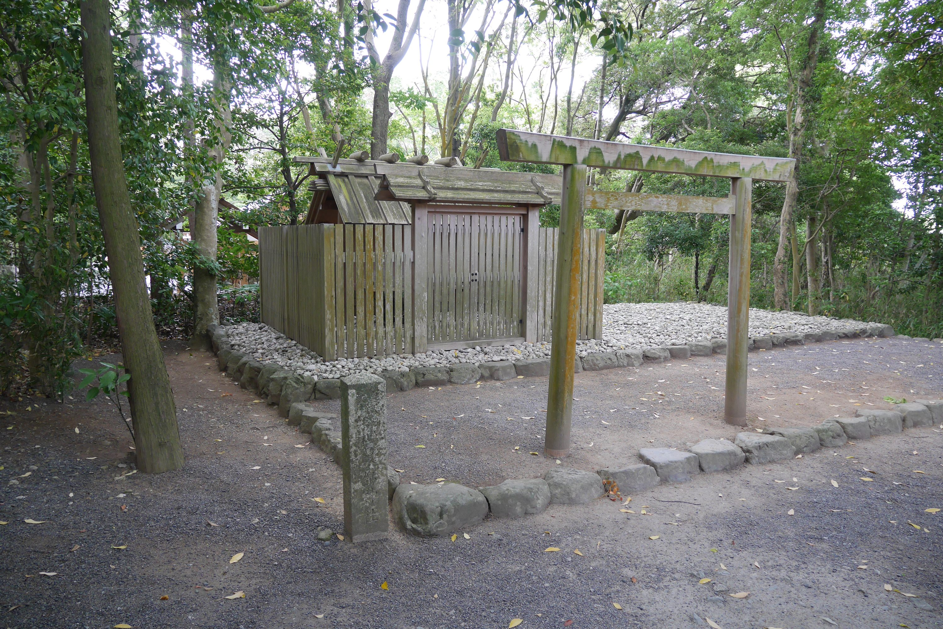 日本の三重県伊勢市にある皇大神宮末社の葭原神社（あしはらじんじゃ）。